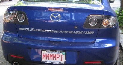 Zoom - Mazda 3 con 27 cifras de pi.